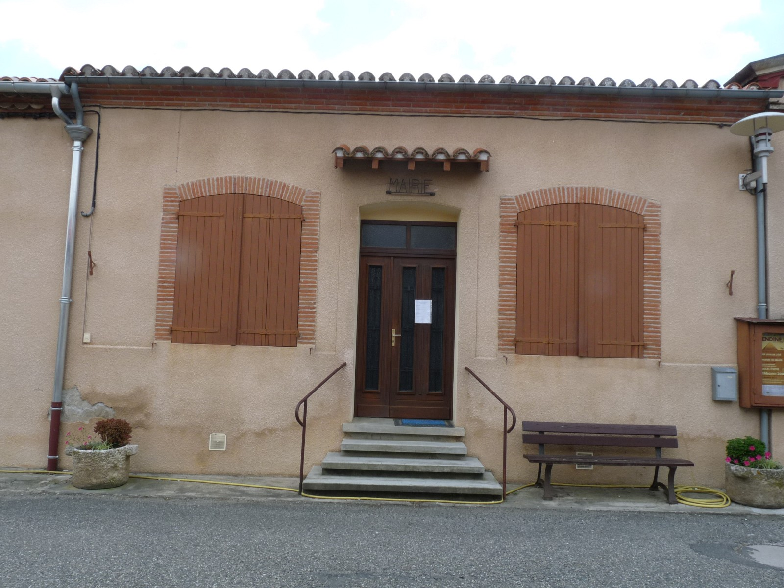 Mairie de Beauville, Haute-Garonne, France